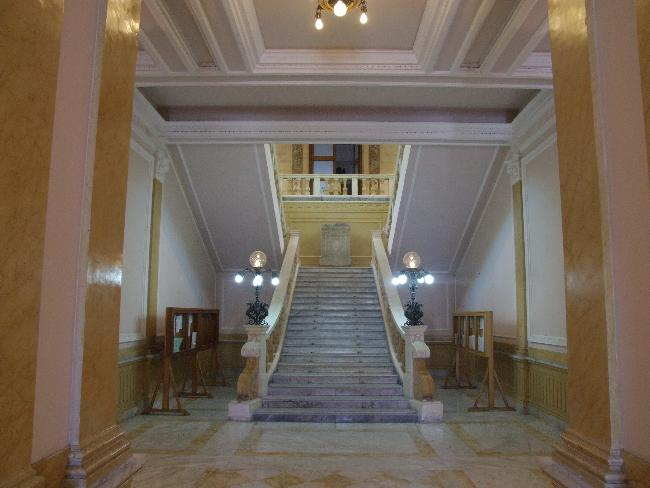 Scalinata palazzo Foti